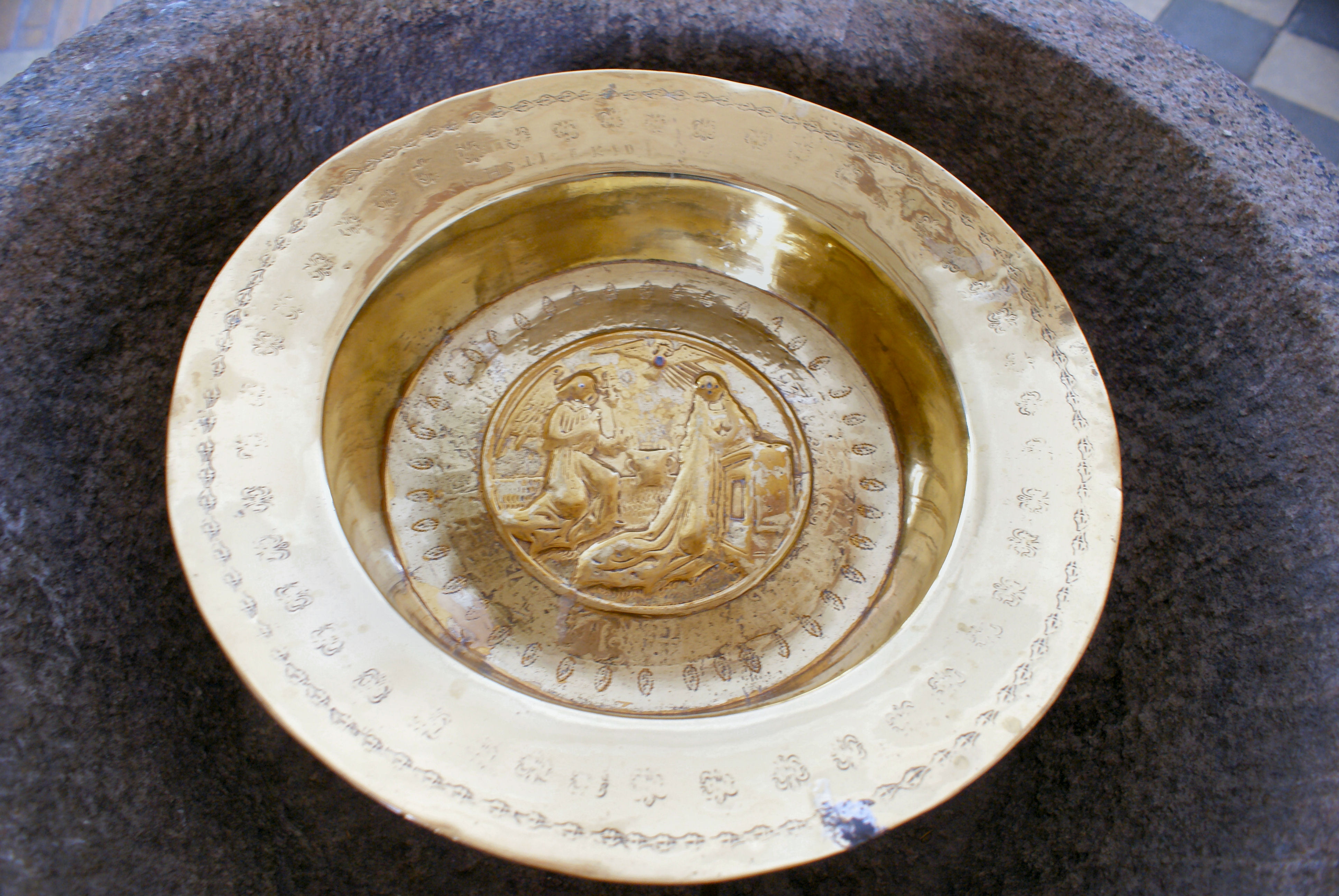 Hald Kirke, dåbsfadet liggende i døbefont, en af de jyske løvefonte, motiv bebudelse